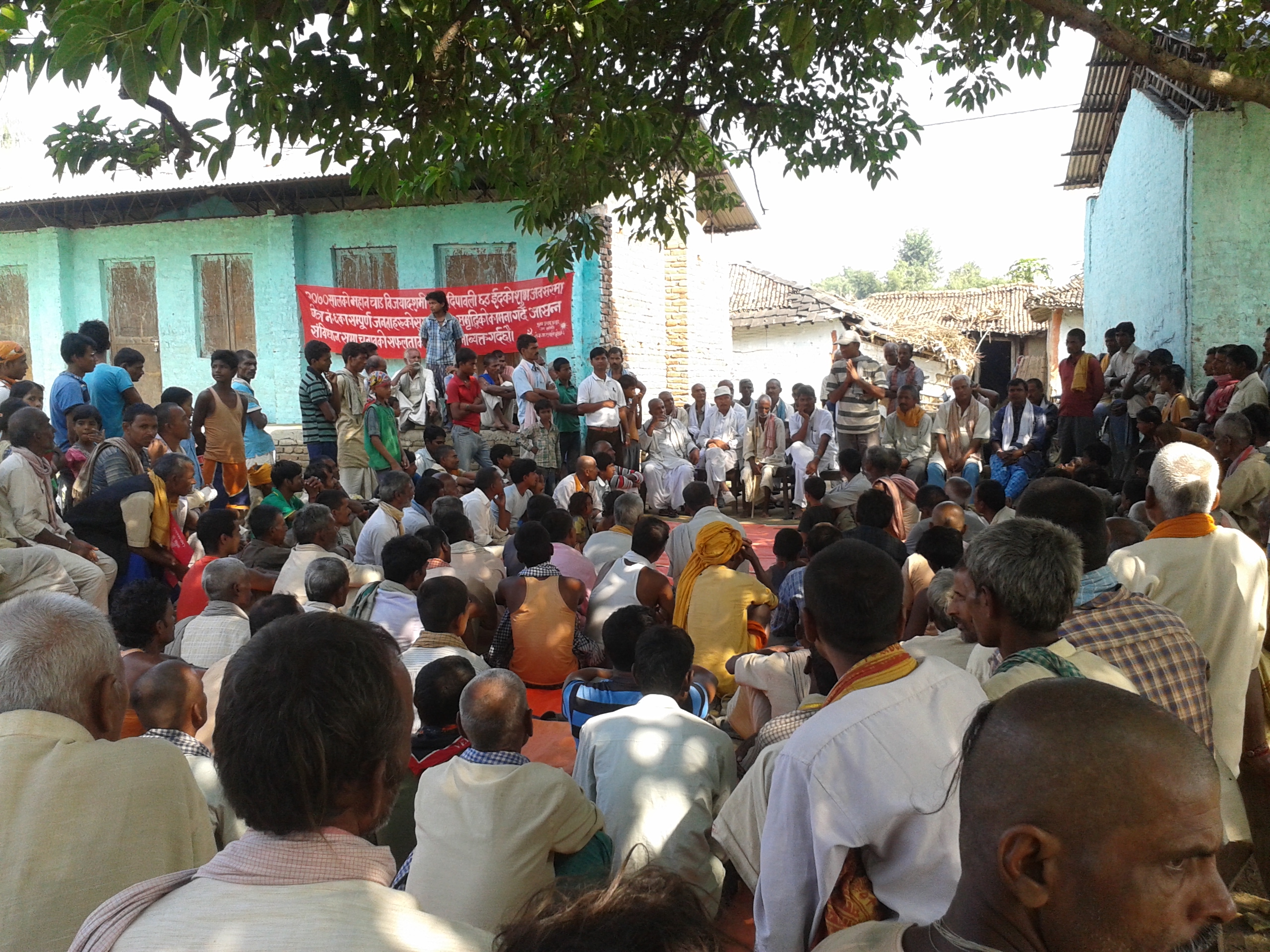 Khairbani people at government school with Ex- VDC President Ramdular Yadav,Dr: Koshilal Yadav,Er: Mahesh Kumar Adhikari,Murali Manohar Adhikari,Krishna Mohan Adhikari,Dhiraj Raj Adhikari and many other Khairbaniers..